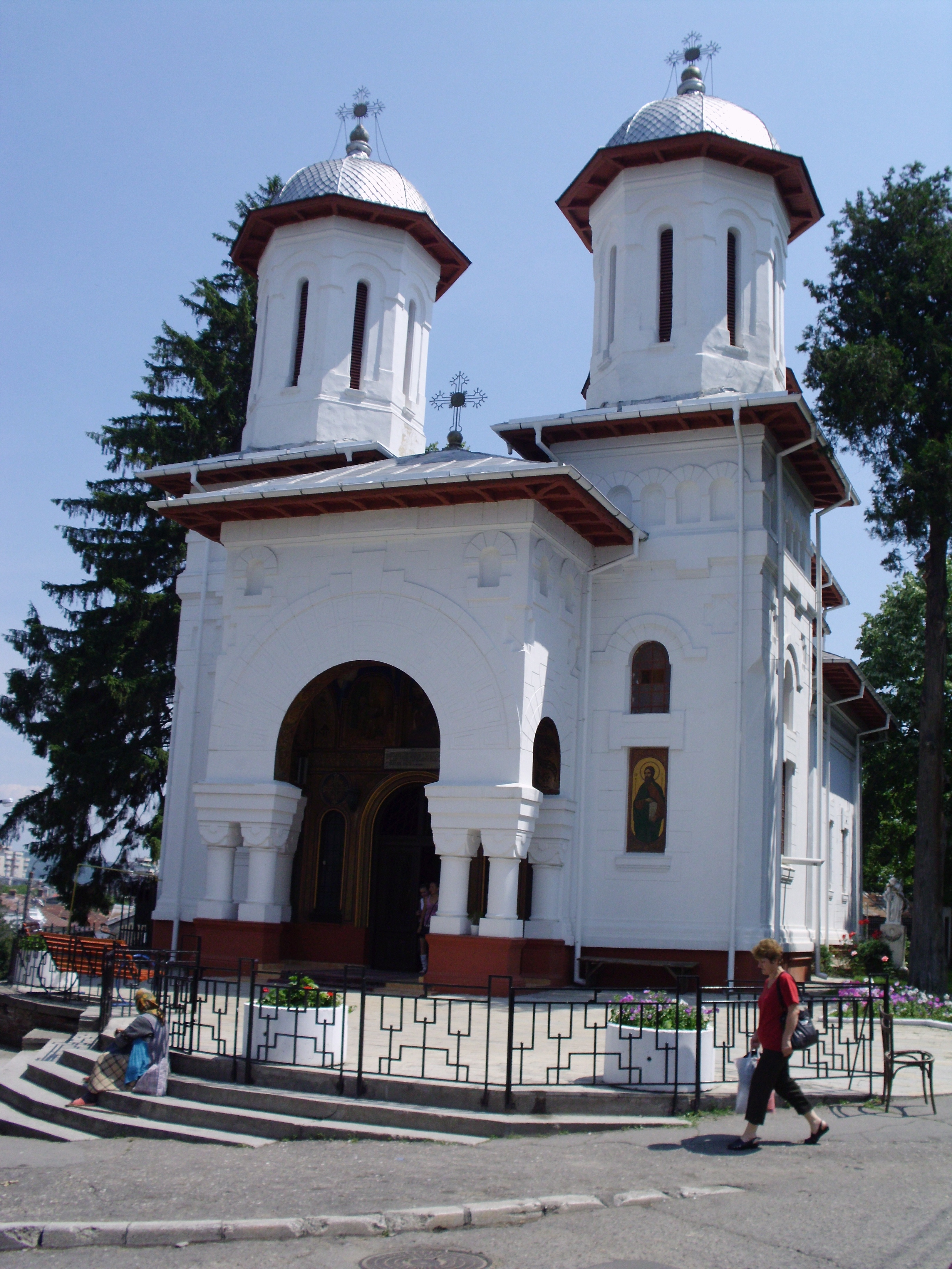 Biserica "Maica Precista"